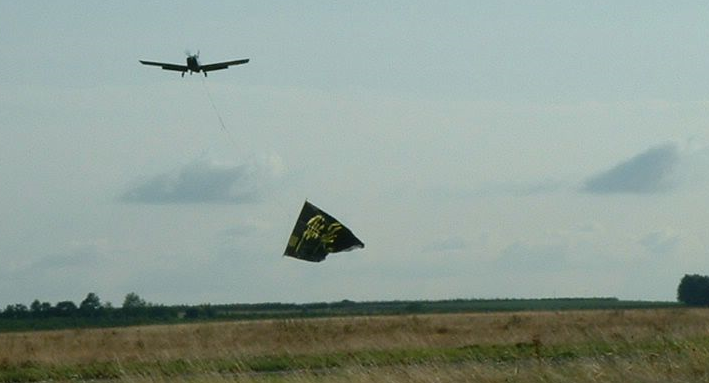 Aufnahme eines Werbebanners im Fangschlepp Das Bild zeigt ein Schleppflugzeug vom TypMorane-Saulnier M.S.880 kurz nach der Aufnahme des Werbebanners für den Zirkus FlicFlac. Es entstand 2002 in Mainz auf dem Flugplatz Mainz-Finthen. Pilotin war Frau Kimberly Marx (Black Baroness). Auf dem Bild zu erahnen ist das relativ kurze Seil am Flugzeug und der Schlepphaken, mit dem das am Boden zwischen zwei Stangen gespannte Schleppseil gefangen wurde.